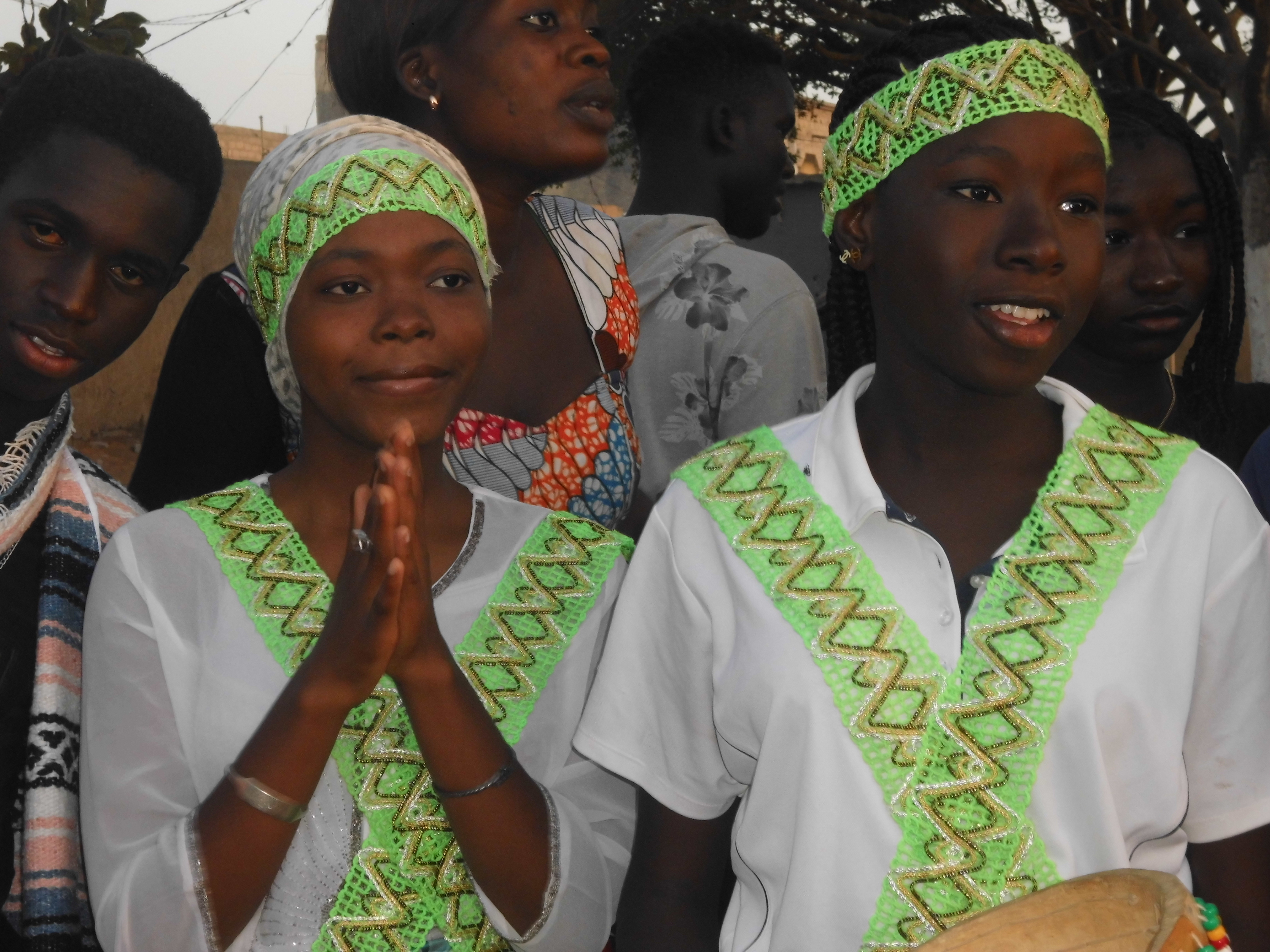 elles sont heureuse de participé sur cet veille culturelle